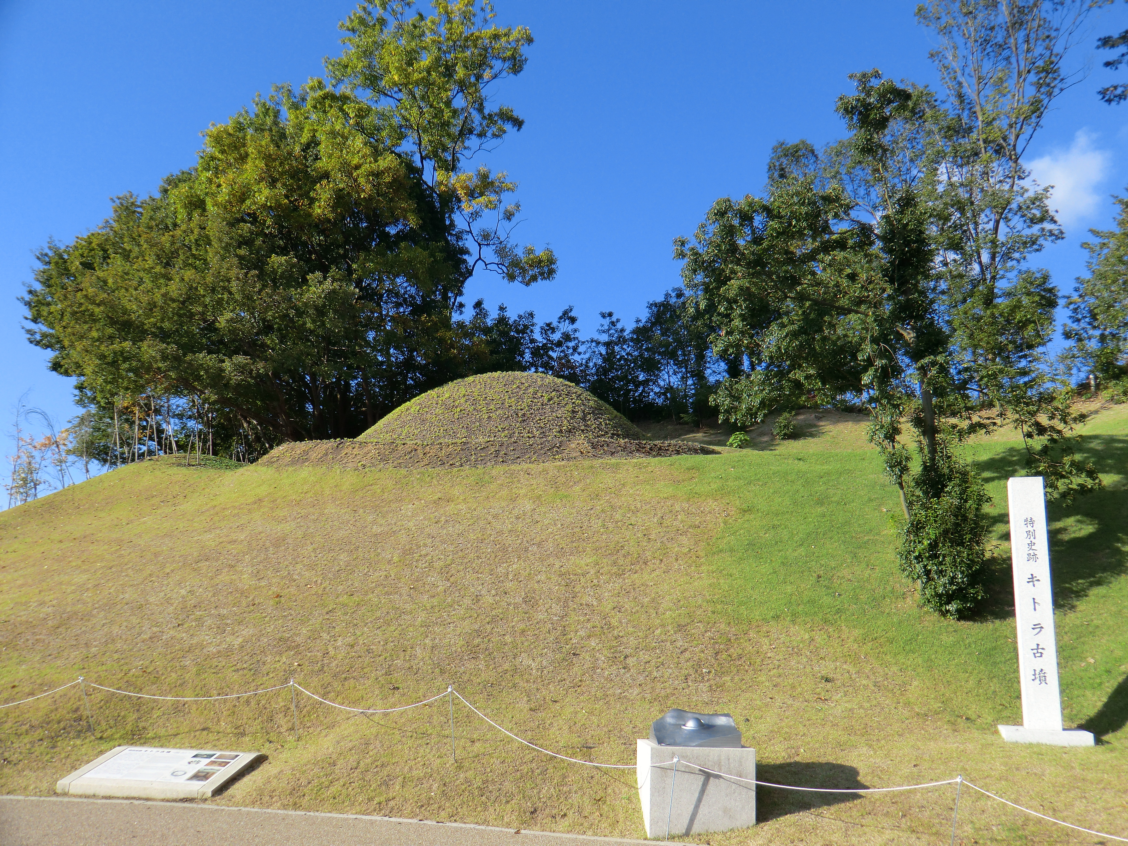 キトラ古墳 (2016年11月撮影)